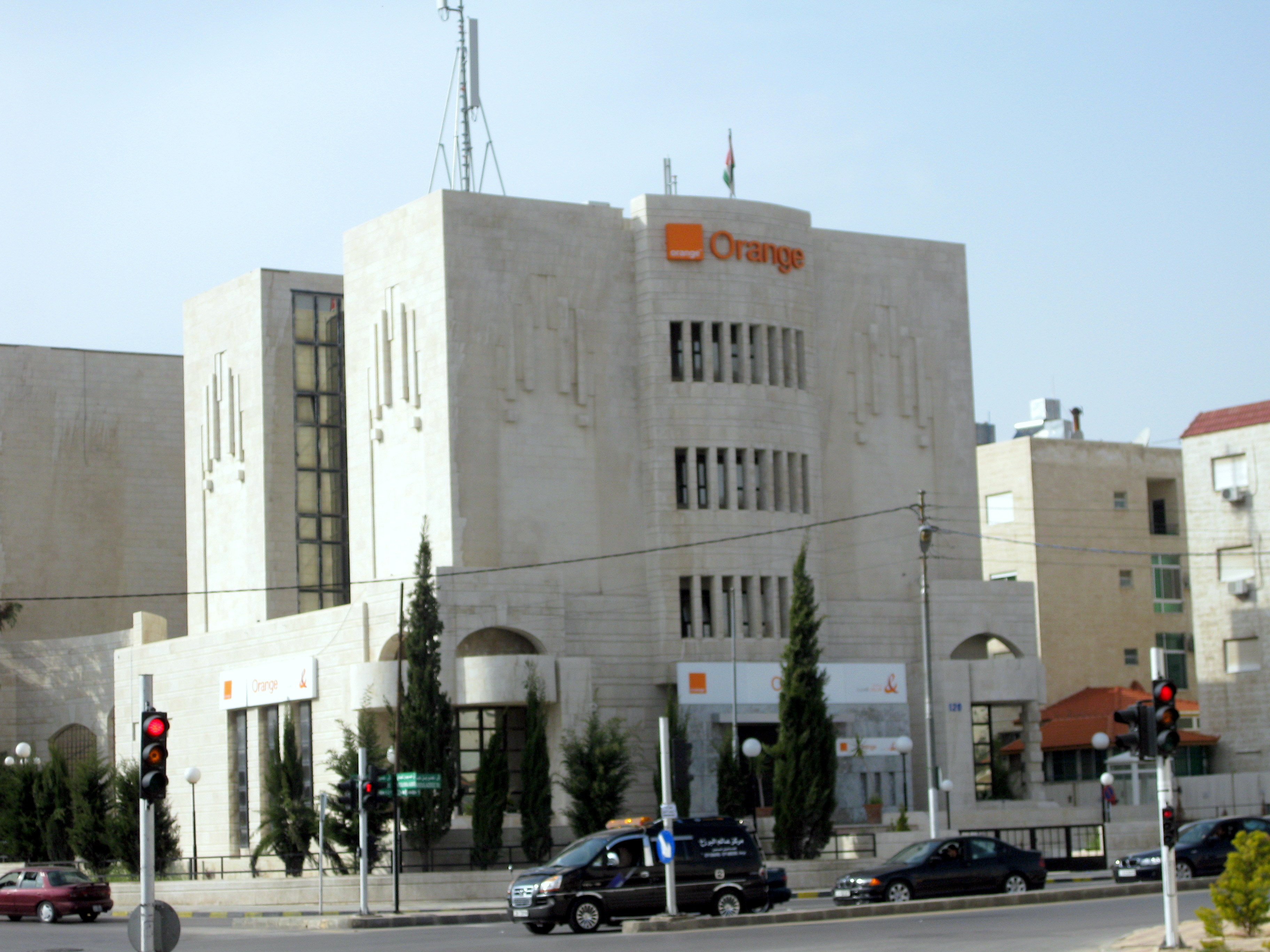 Orange - Jordan